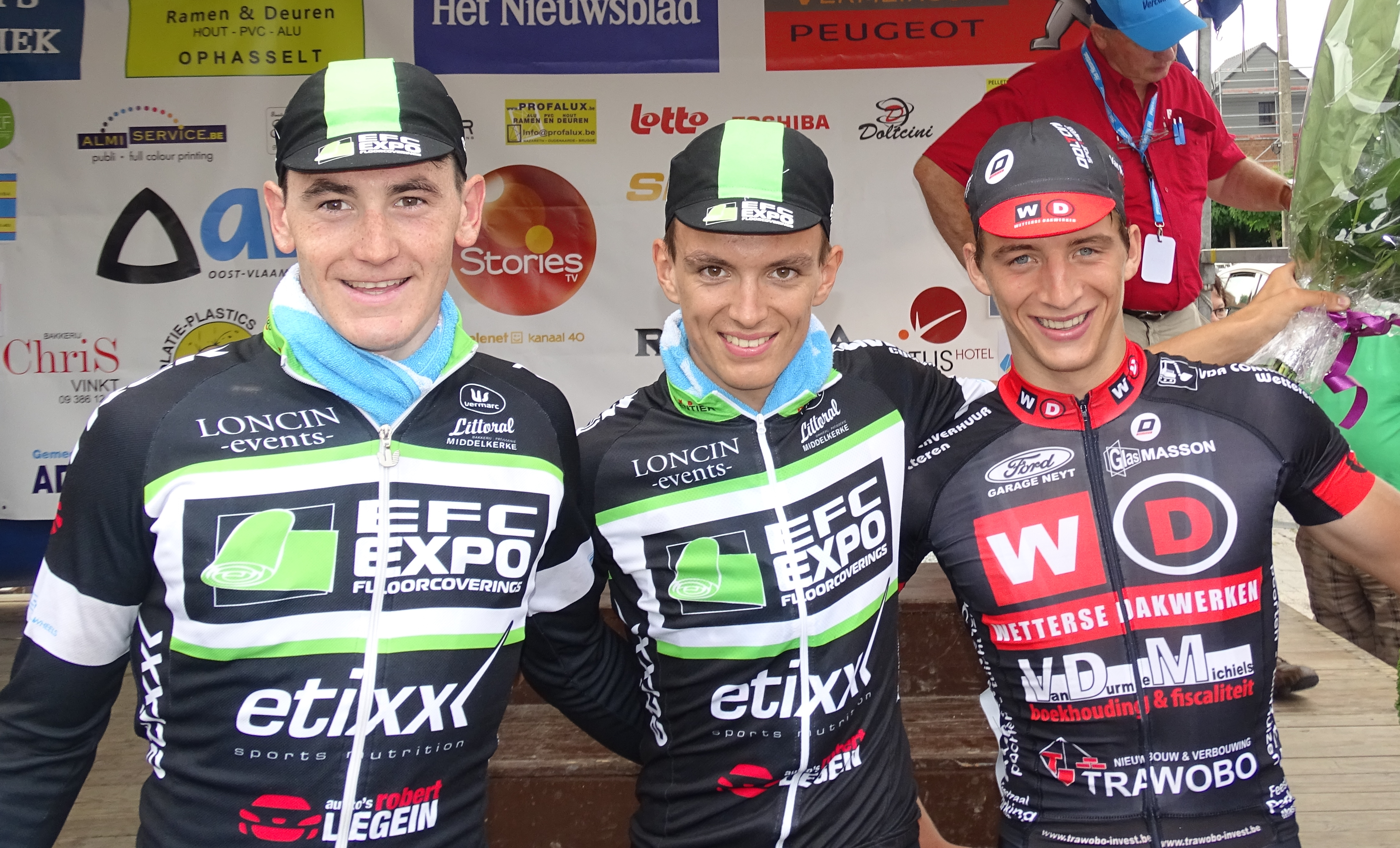 Reportage réalisé le jeudi 20 août à l'occasion du départ et de l'arrivée de la deuxième étape du Tour de Flandre-Orientale 2015 à Sinaai (Saint-Nicolas), Belgique.